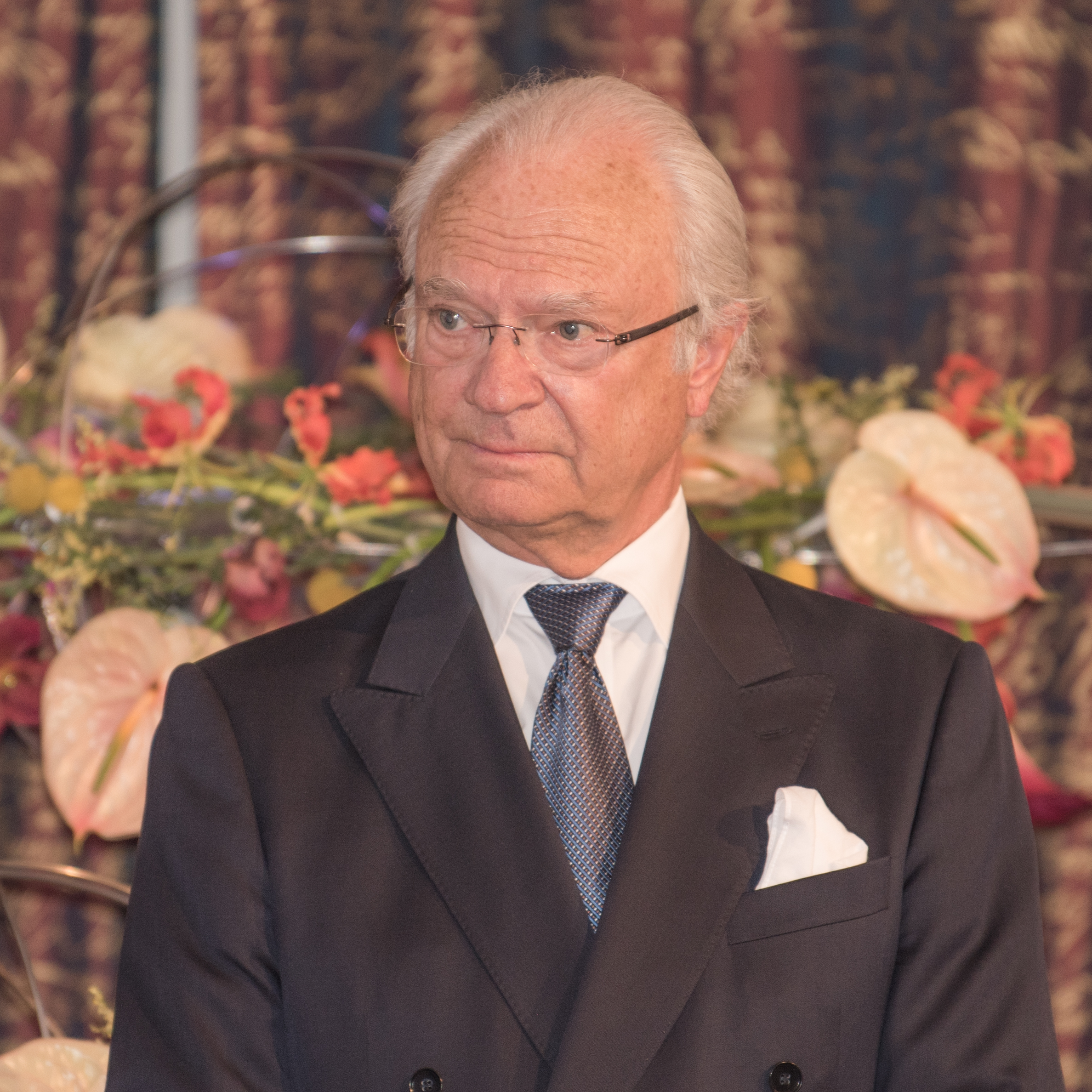 Crafoord Prize 2018, Geosciences, Kungliga Vetenskapsakademien, Syukuro Manabe and Susan Solomon